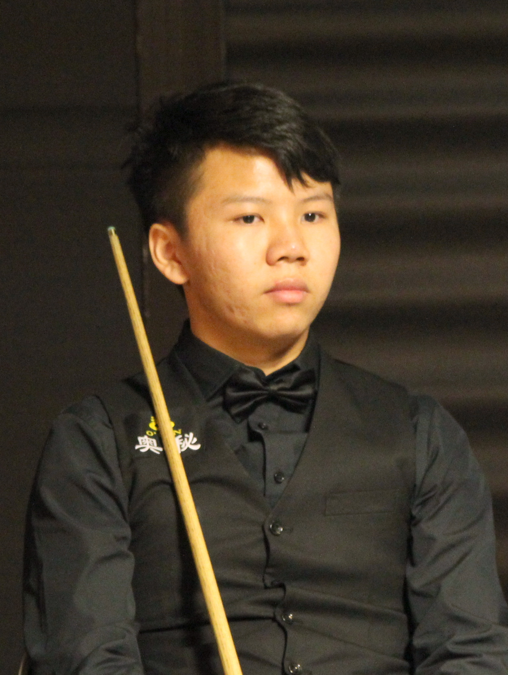 Zhou Yuelong beim Paul Hunter Classic 2016